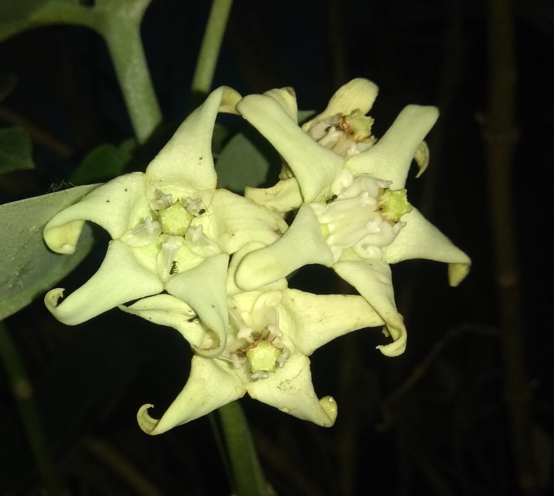 ಕನ್ನಡ: ಬಿಳಿ ಎಕ್ಕದ ಹೂವು